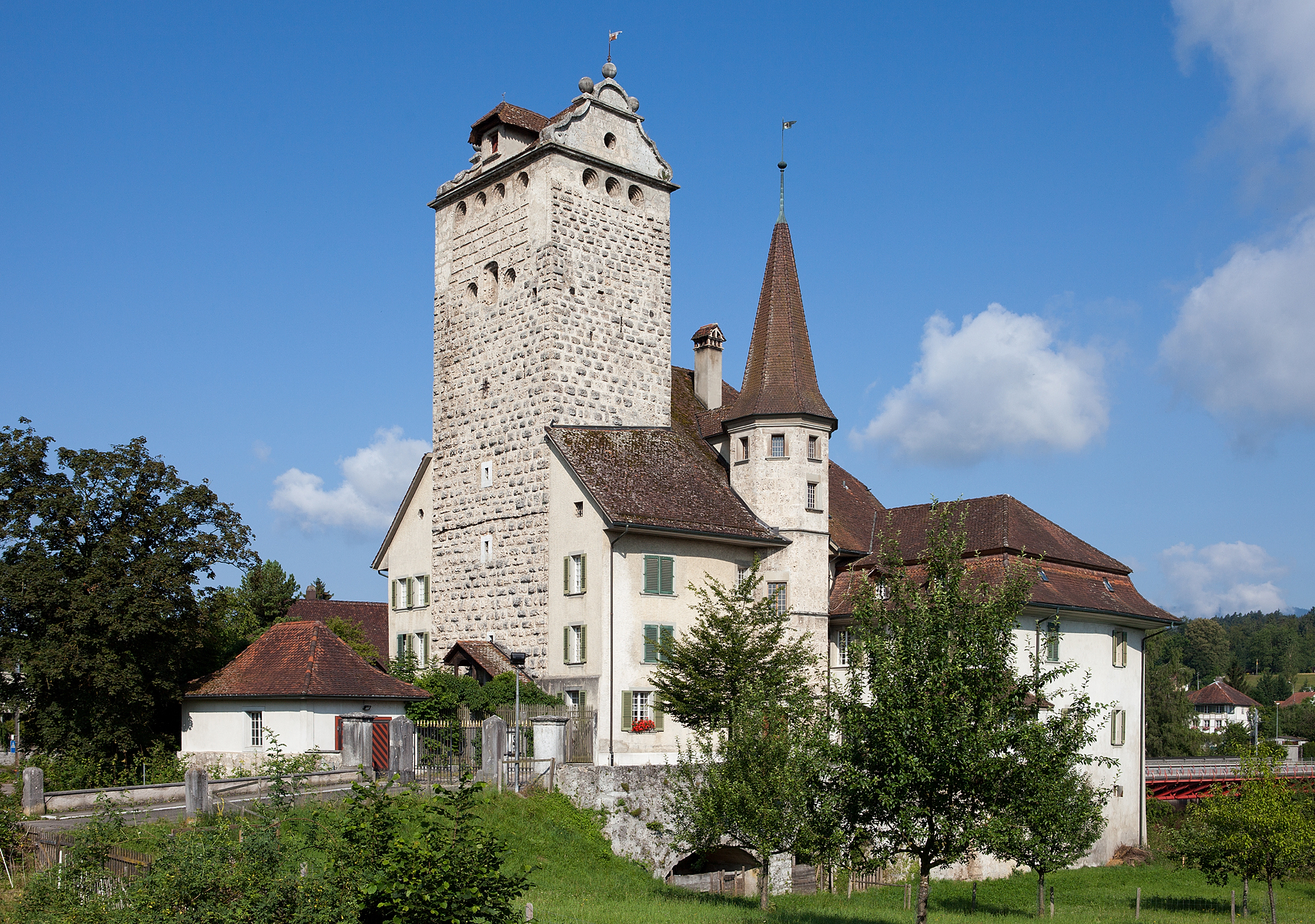 Schloss Aarwangen (BE)